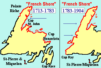 Droits de pêches français à Terre-Neuve